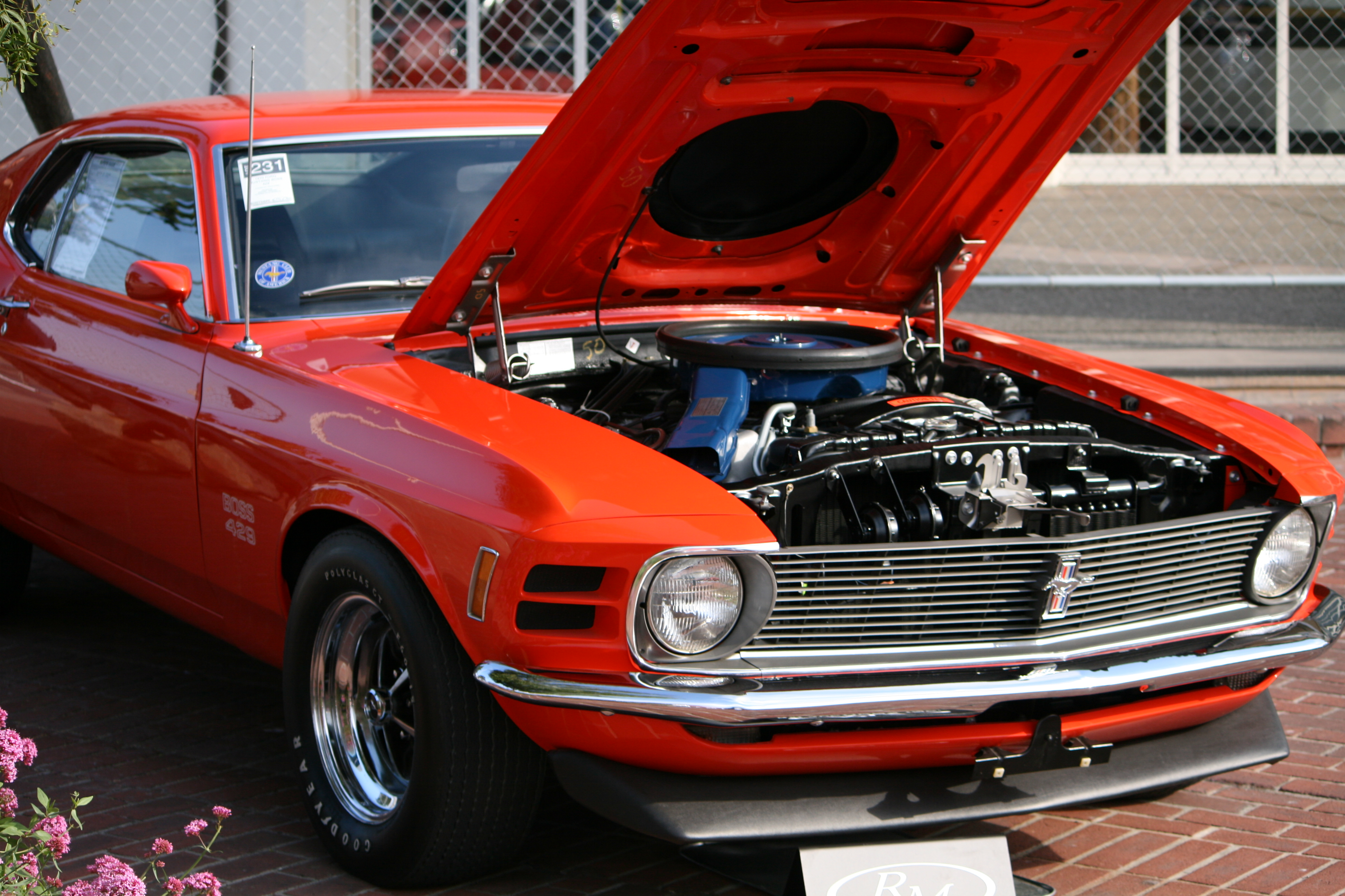 Sold for $231,000